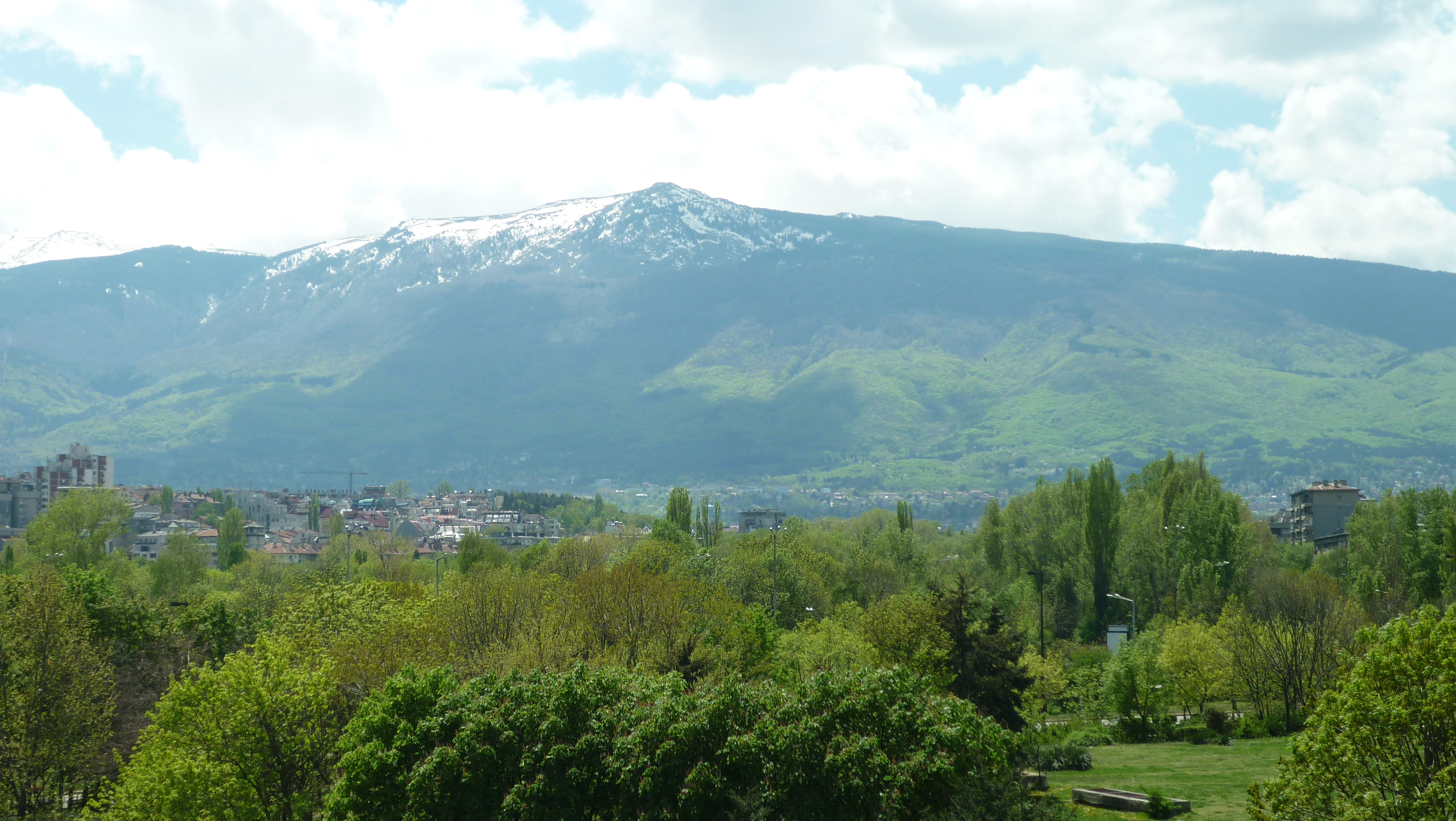 Витоша, заснета от НДК